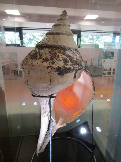 遠藤貝類博物館にあったアラフラオオニシの1個体